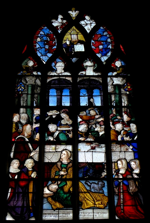 Le repas chez Simon. Baie 5 de l'église Notre-Dame-des-Marais de La Ferté-Bernard (72).